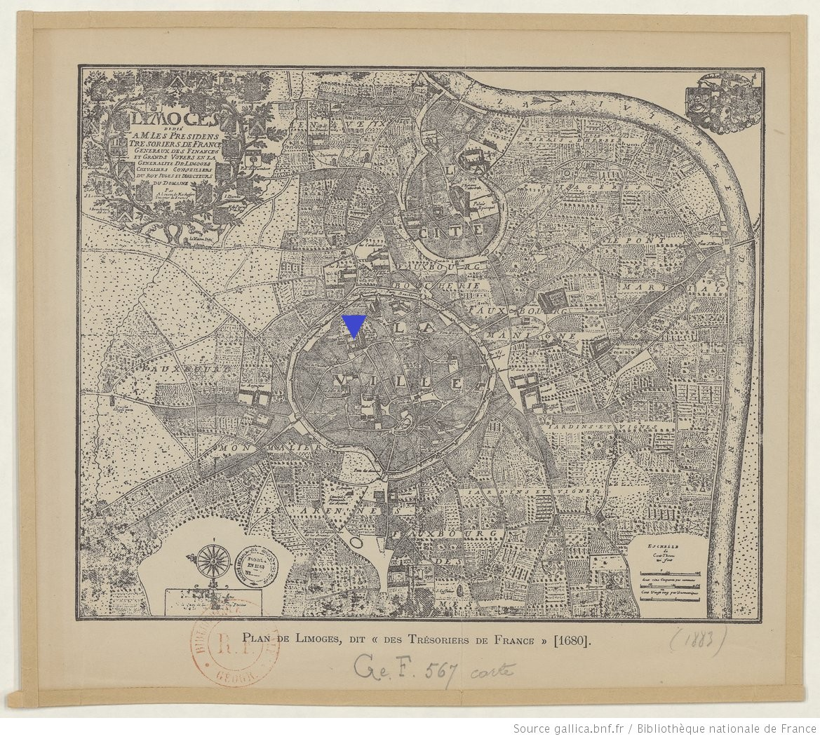 Plan ancien de Saint-Martial de Limoges, distinguant le quartier de la Cité, autour de la cathédrale, et celui de la Ville, qui comprend l'abbatiale Saint-Martial indiquée par un triangle bleu sur la pointe.